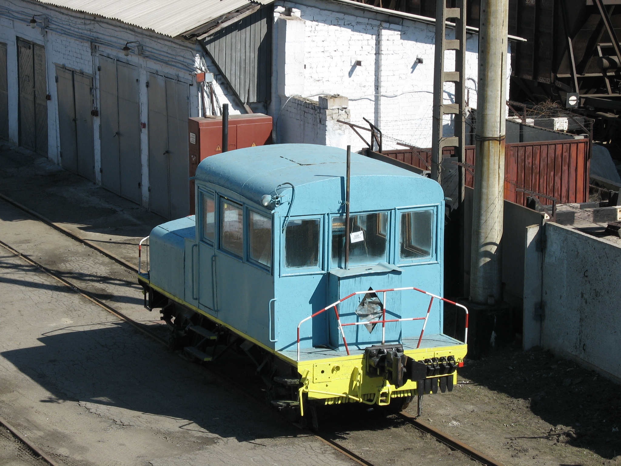 Мотовоз М К/2 15 выпускал Калужский завод с 1947 года. Мотовоз был предназначен для маневровых работ на железнодорожных станциях, подъездных и складских путях, внутризаводских путях.